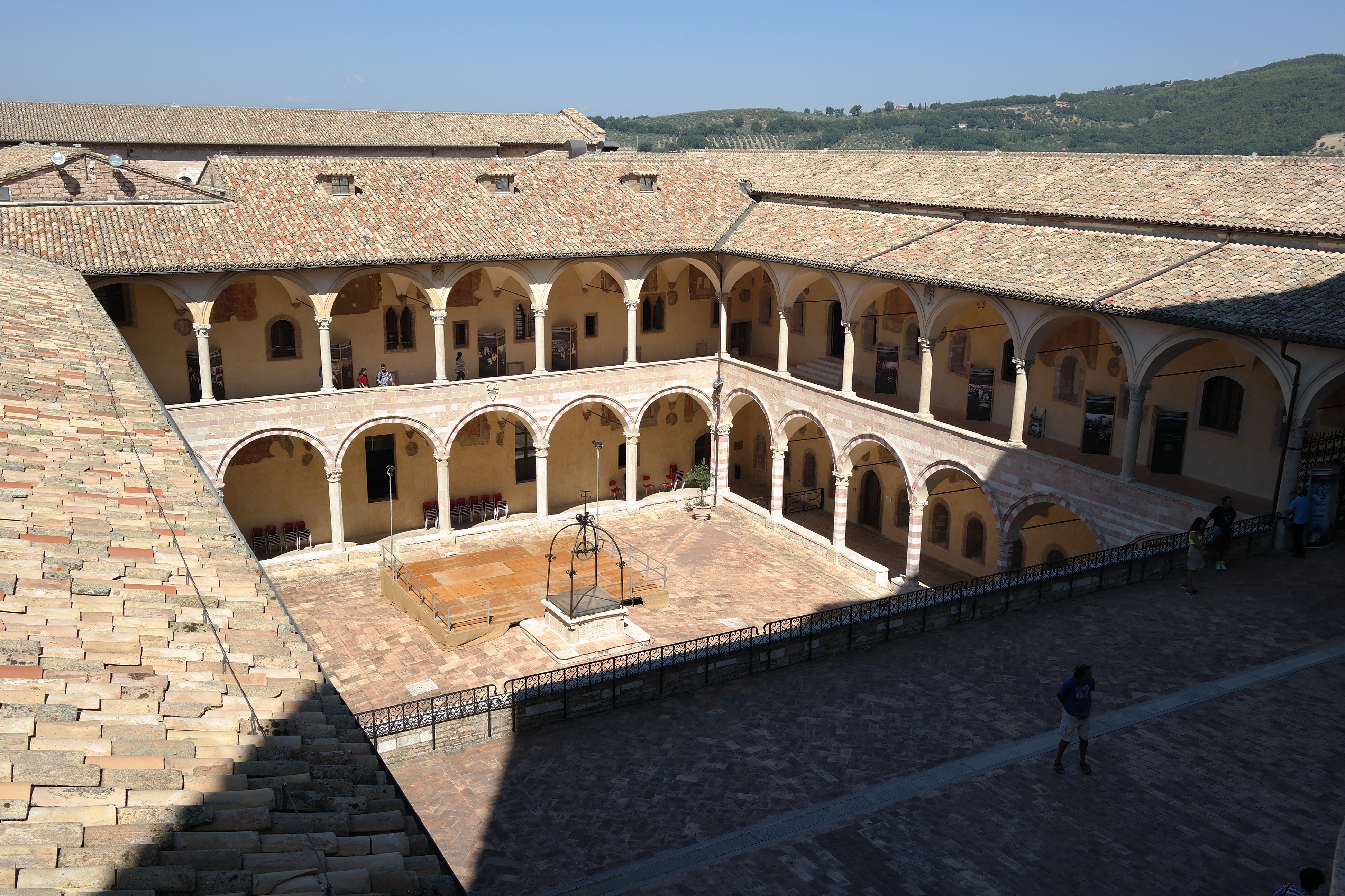 Chiostro della Basilica di San Francesco d'Assisi